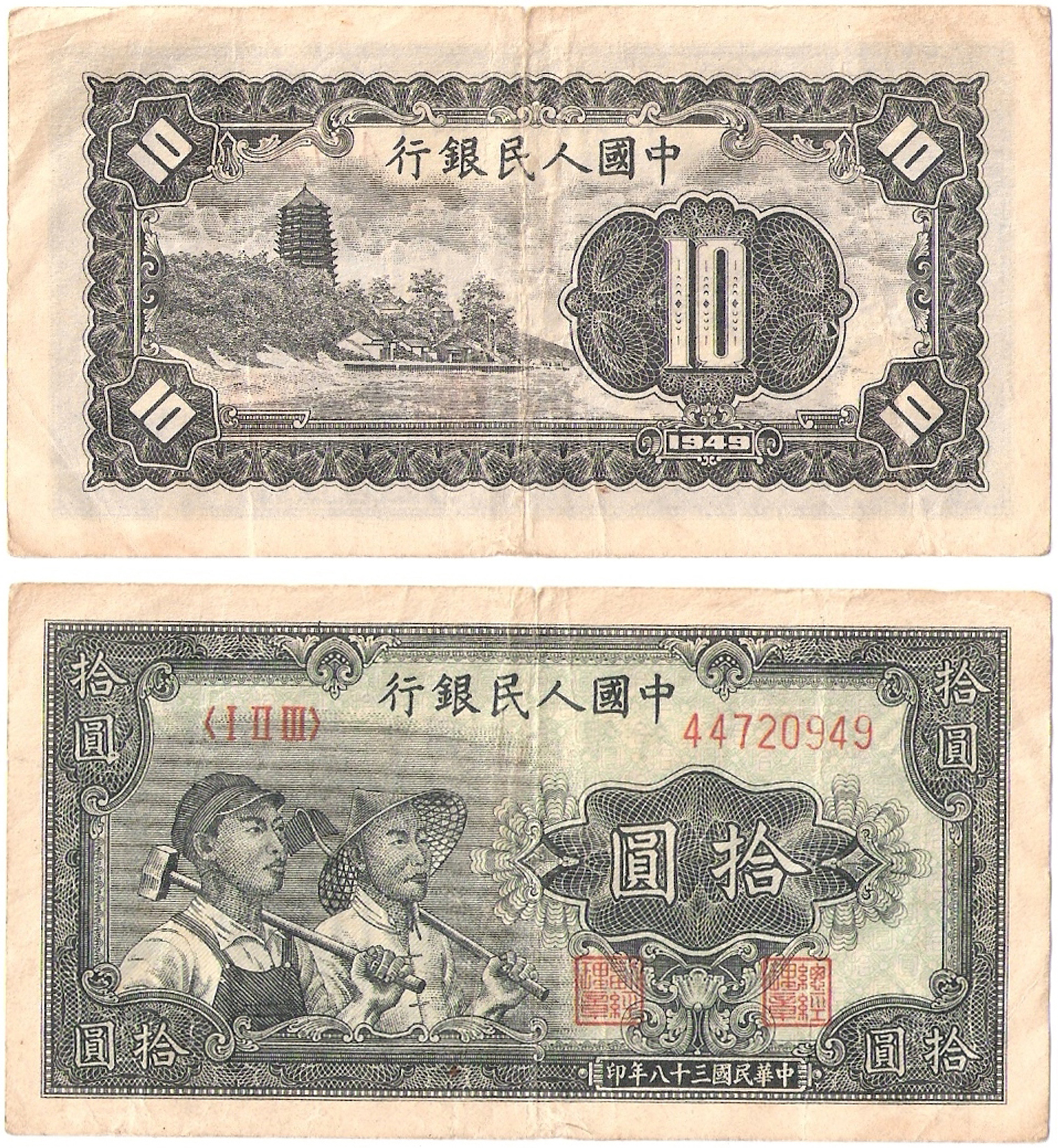 第一版人民币（RMB）10元，1949年发行。